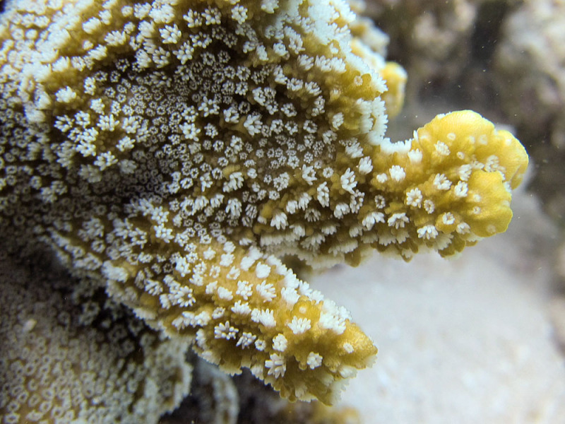 Montipora hispida, con pólipos expandidos